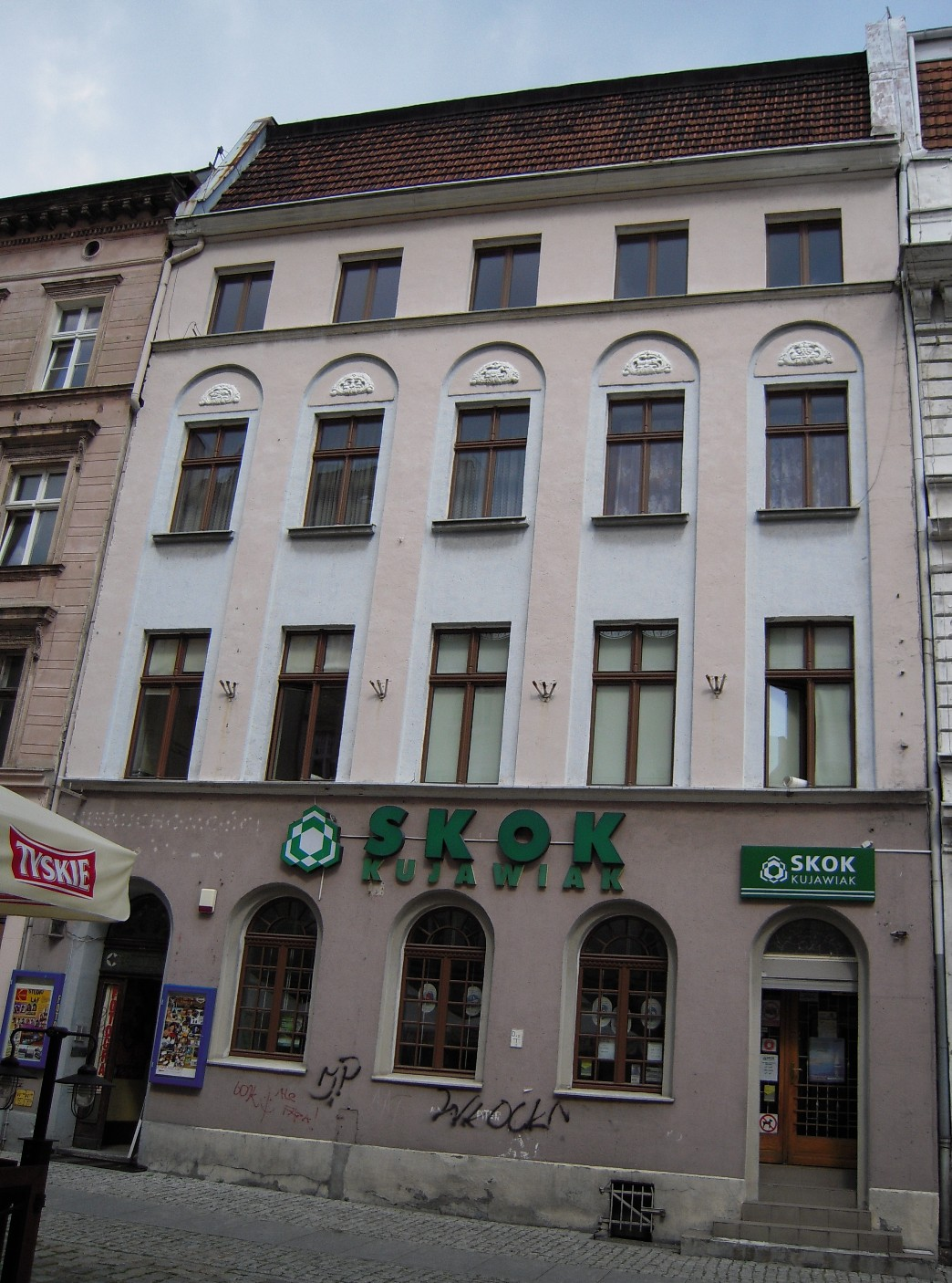 Toruń, ul. Mostowa 32 - kamienica z oficynami, k. XVIII-XIX w. (zabytek A/8)